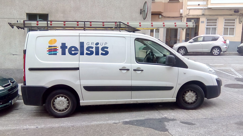 Furgo de Itelsis na Coruña.